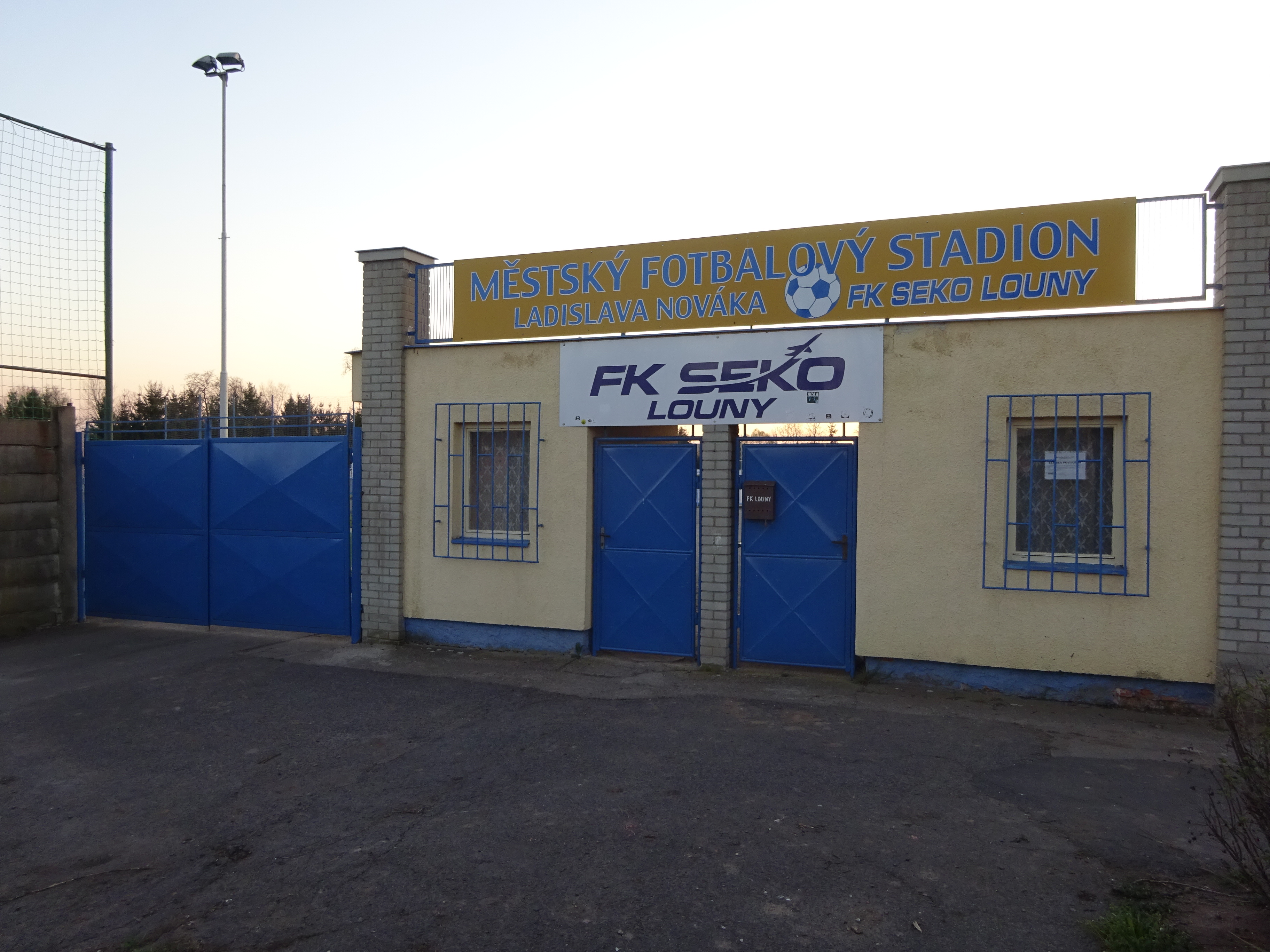 hřiště FK Louny